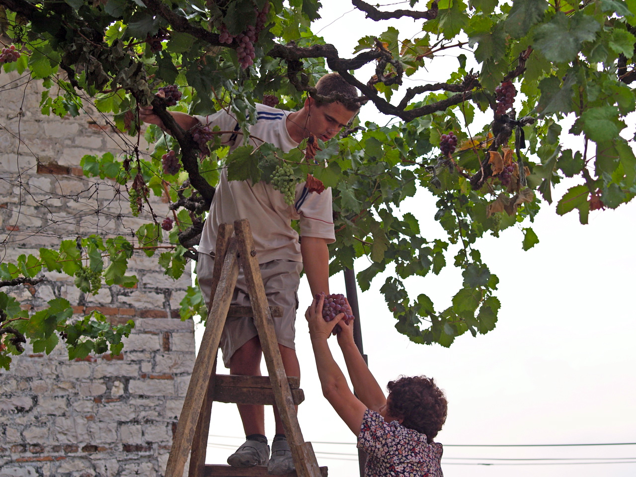 Picking grapes in Berat, Albania